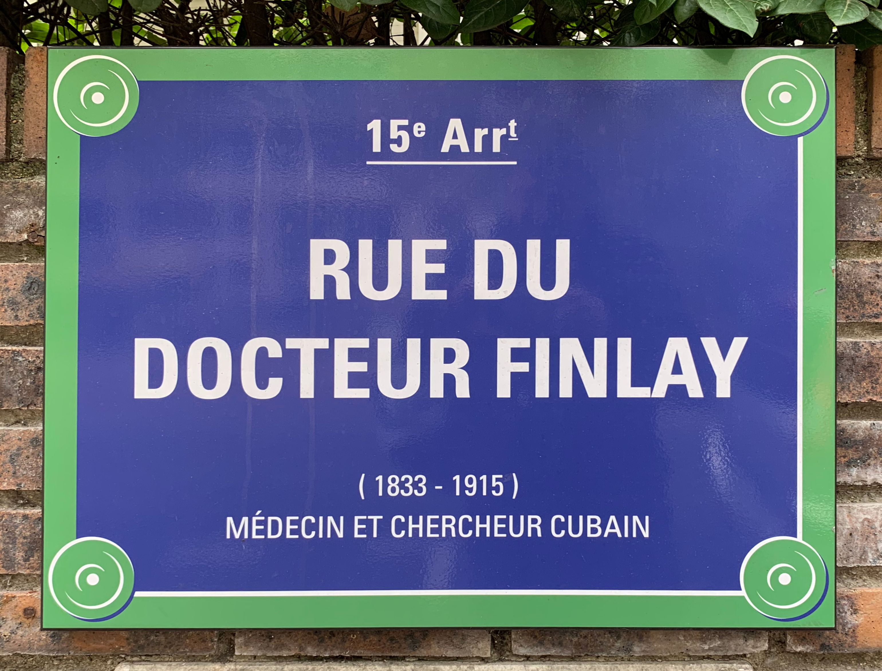 Plaque de la rue du Docteur Finlay (Paris).